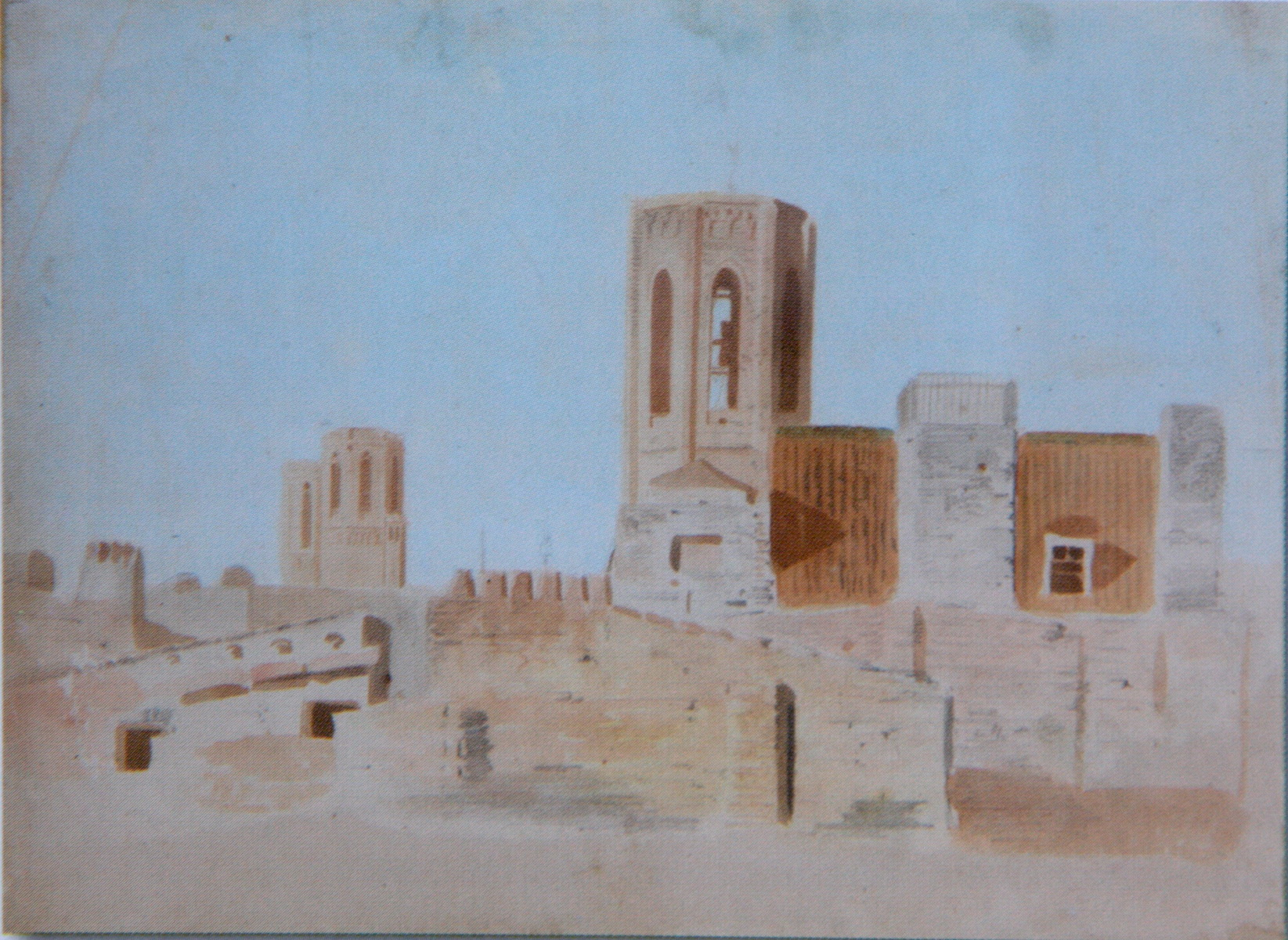 Obra de Josep Tapiró i Baró del període de formació Vista del barri del Raval de Barcelona des de la finestra del seu estudi.